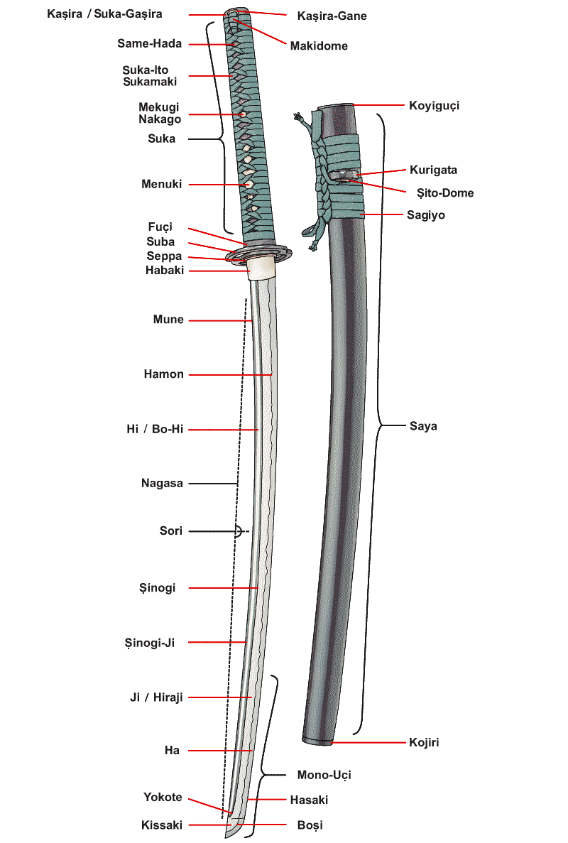 Katana bileşenlerini gösteren şema. Orijinali: Commons:Image:Katana (shema).png